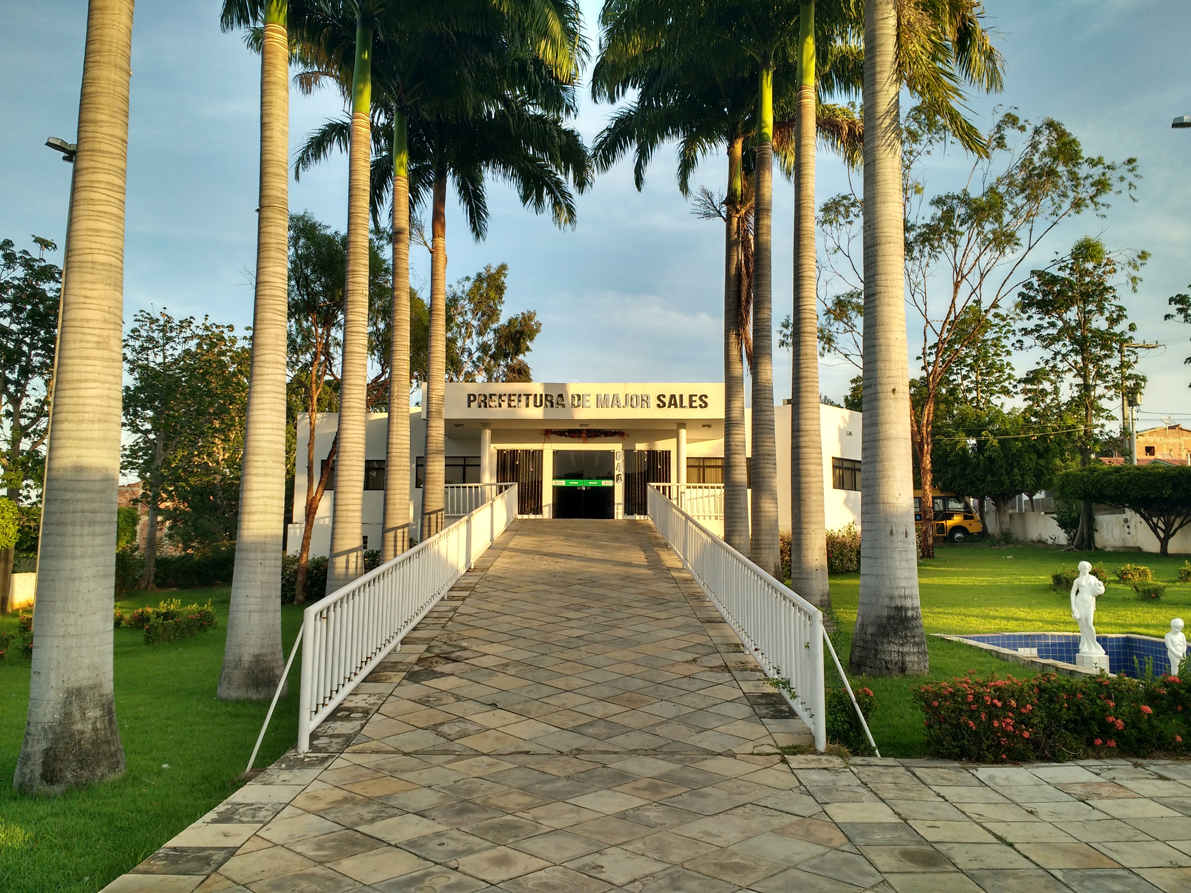 Prefeitura Municipal de Major Sales, Rio Grande do Norte (Brasil)